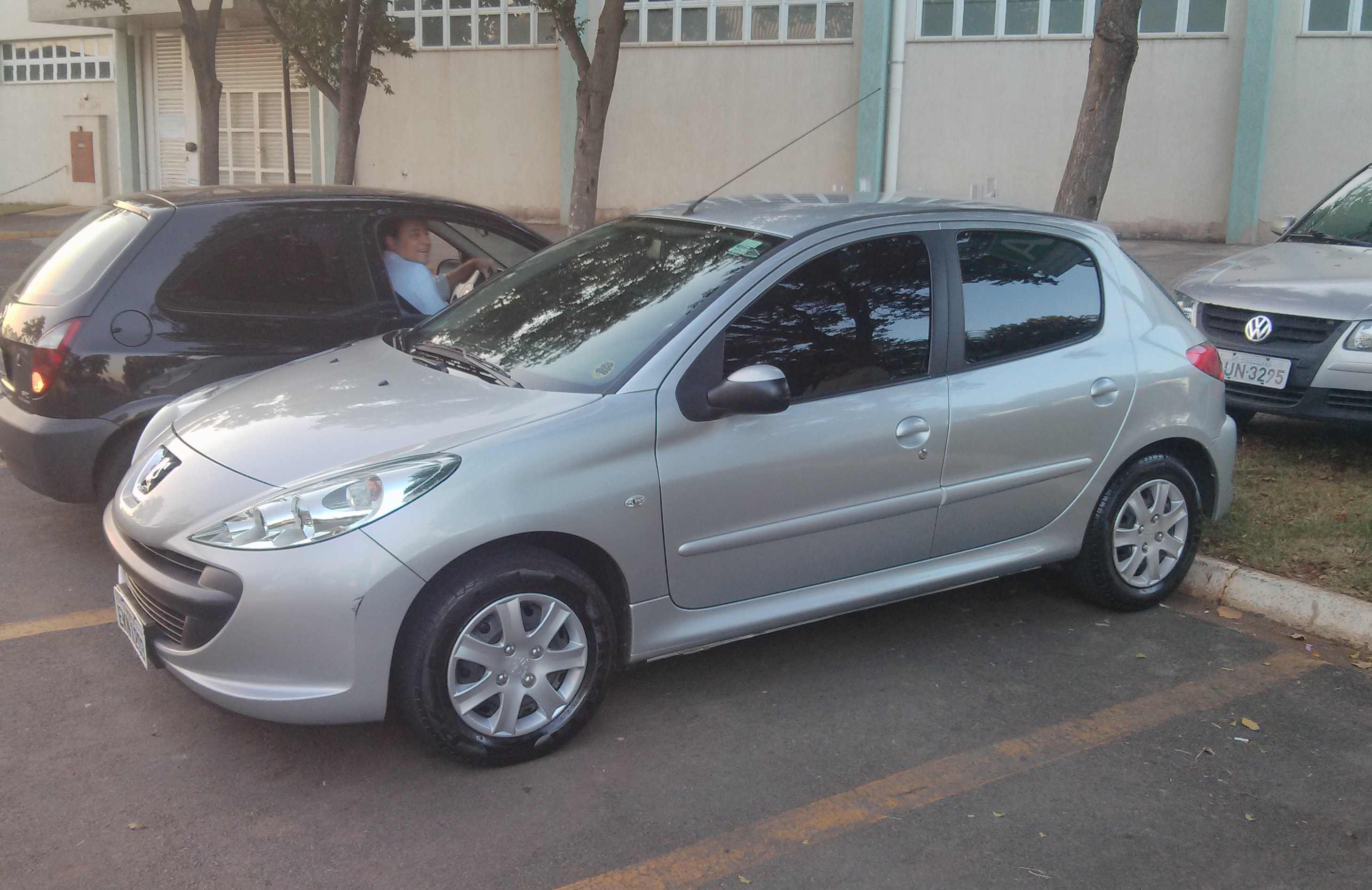 Peugeot 207